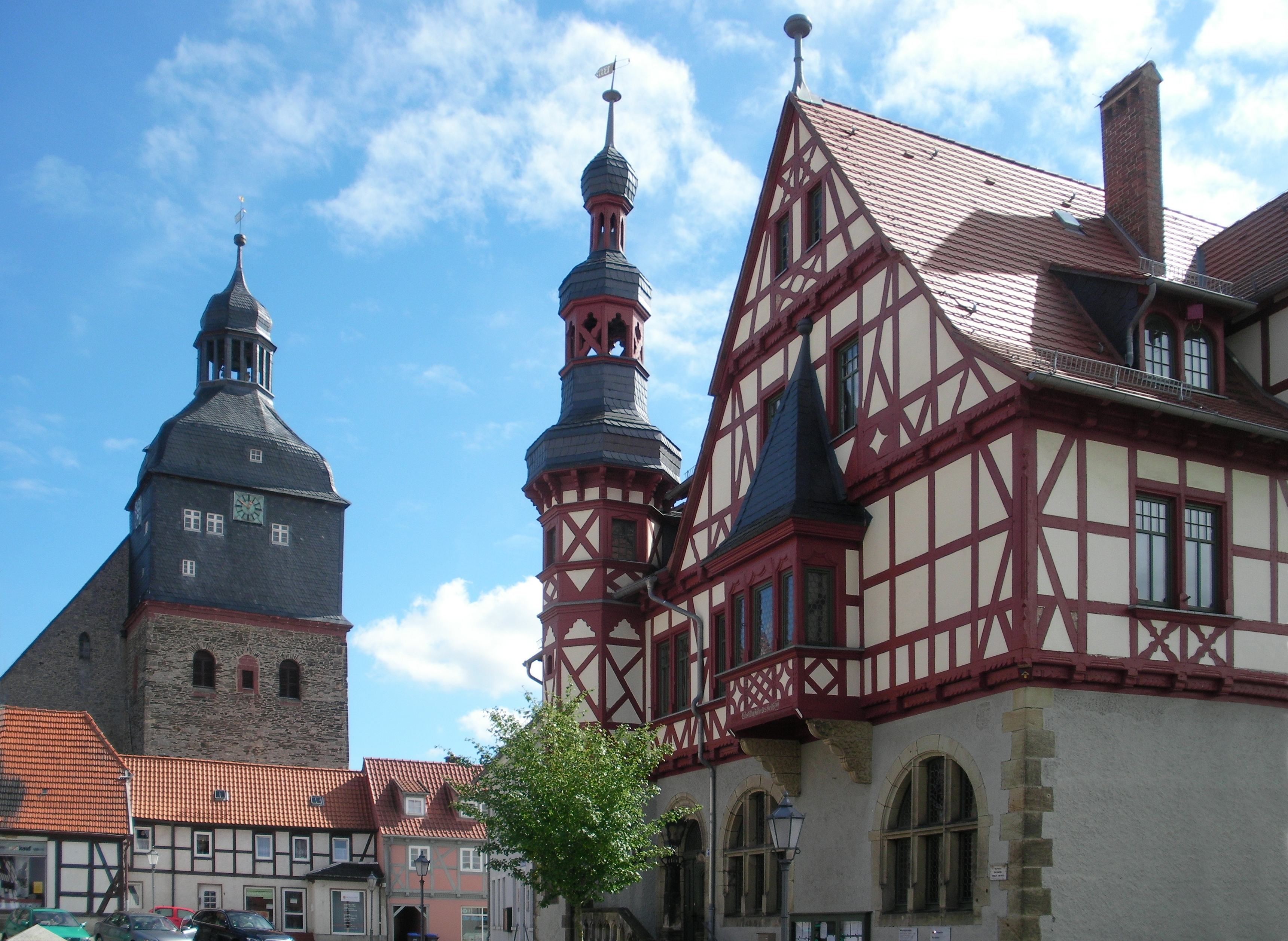 Harzgerode, Rathaus und St.-Marien-Kirche